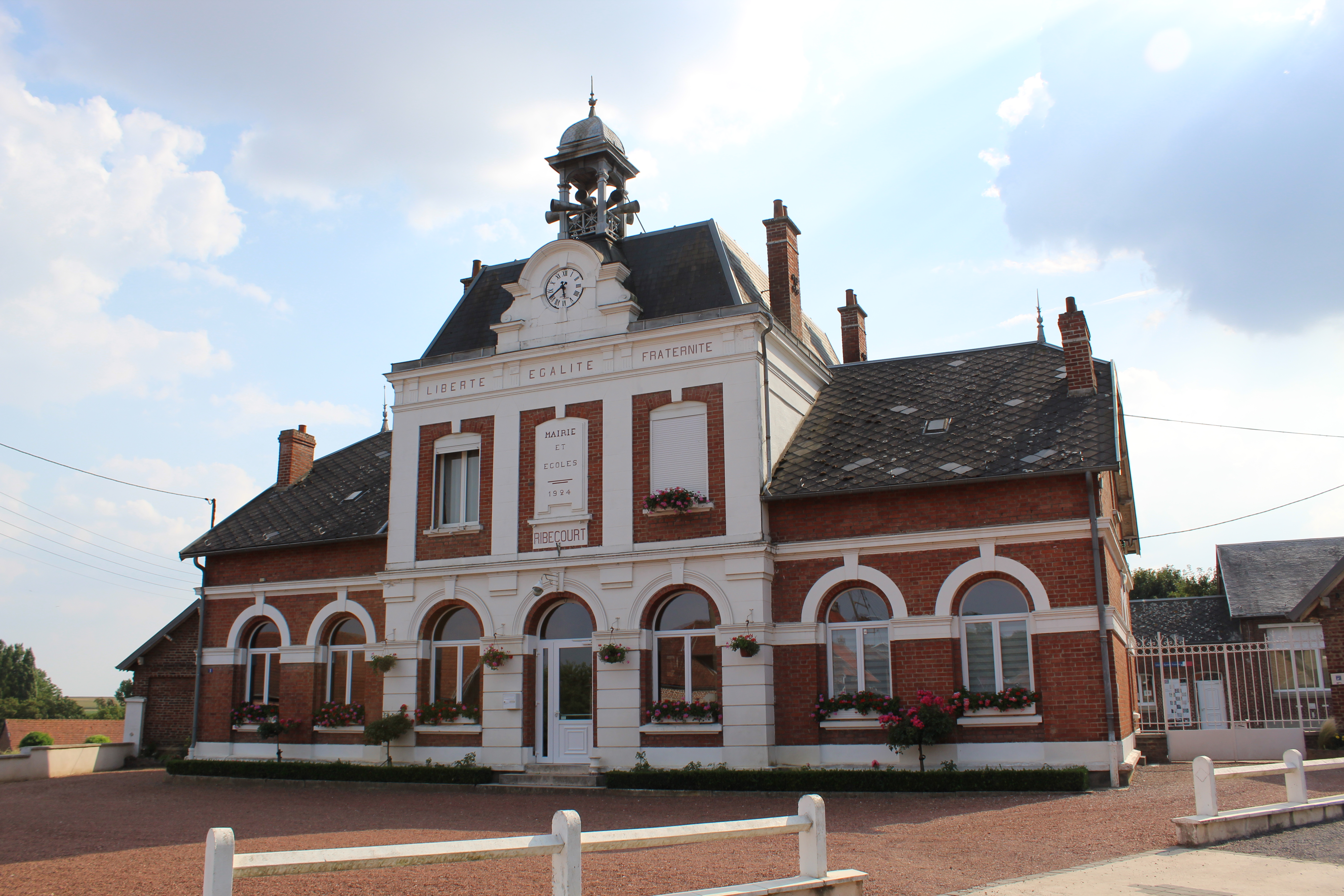 La Mairie